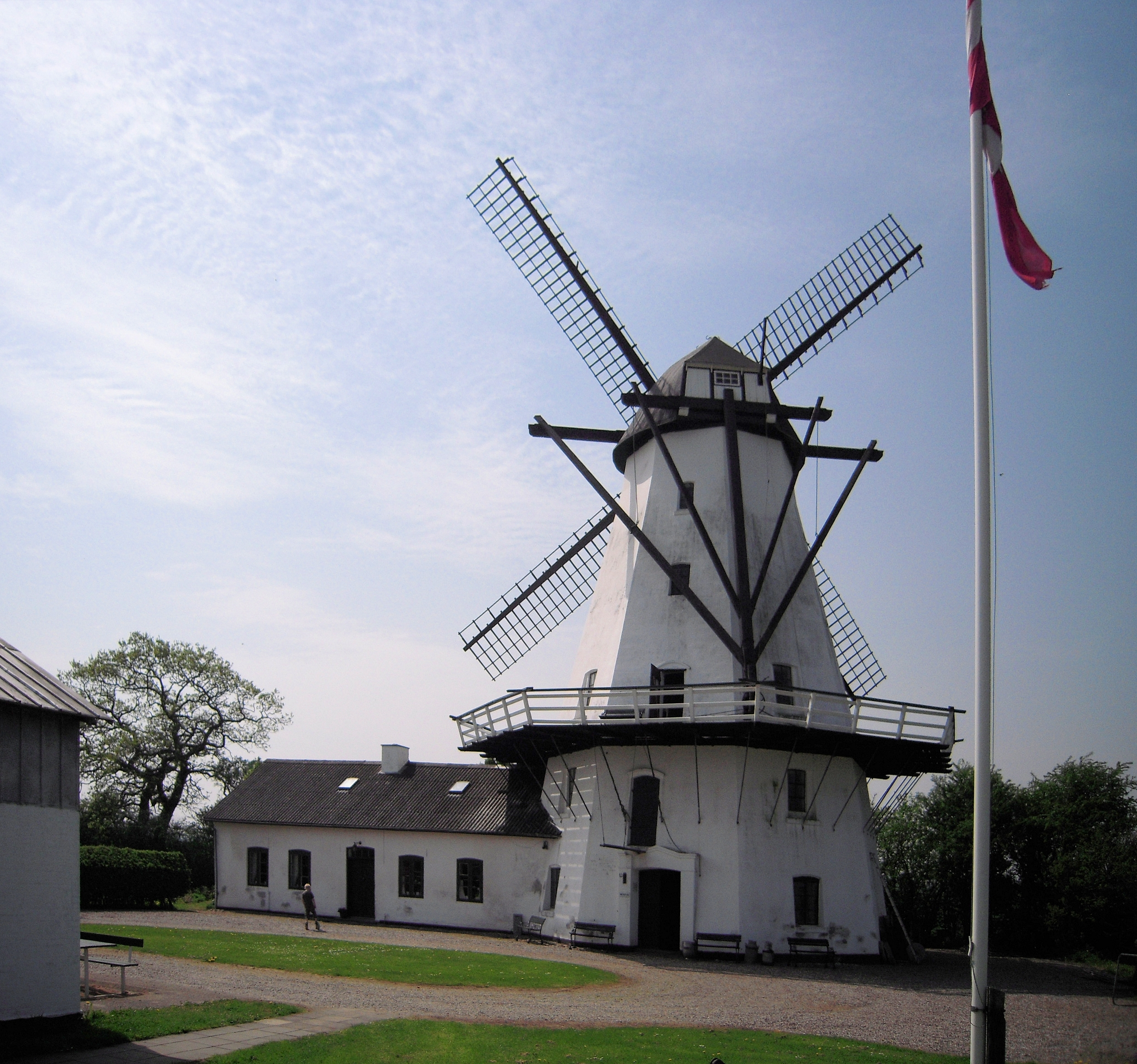 Sillerup Mølle ved Haderslev, en helmuret, fuldt funktionsdygtig museumsmølle